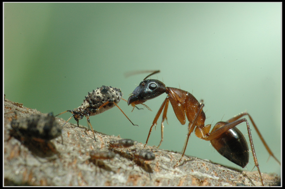 קמפונית קדושה וכנימת לכנוס הגלעיניים Camponotus sanctus and Pterochloroides persicae Kit lens + Reversed 50mm